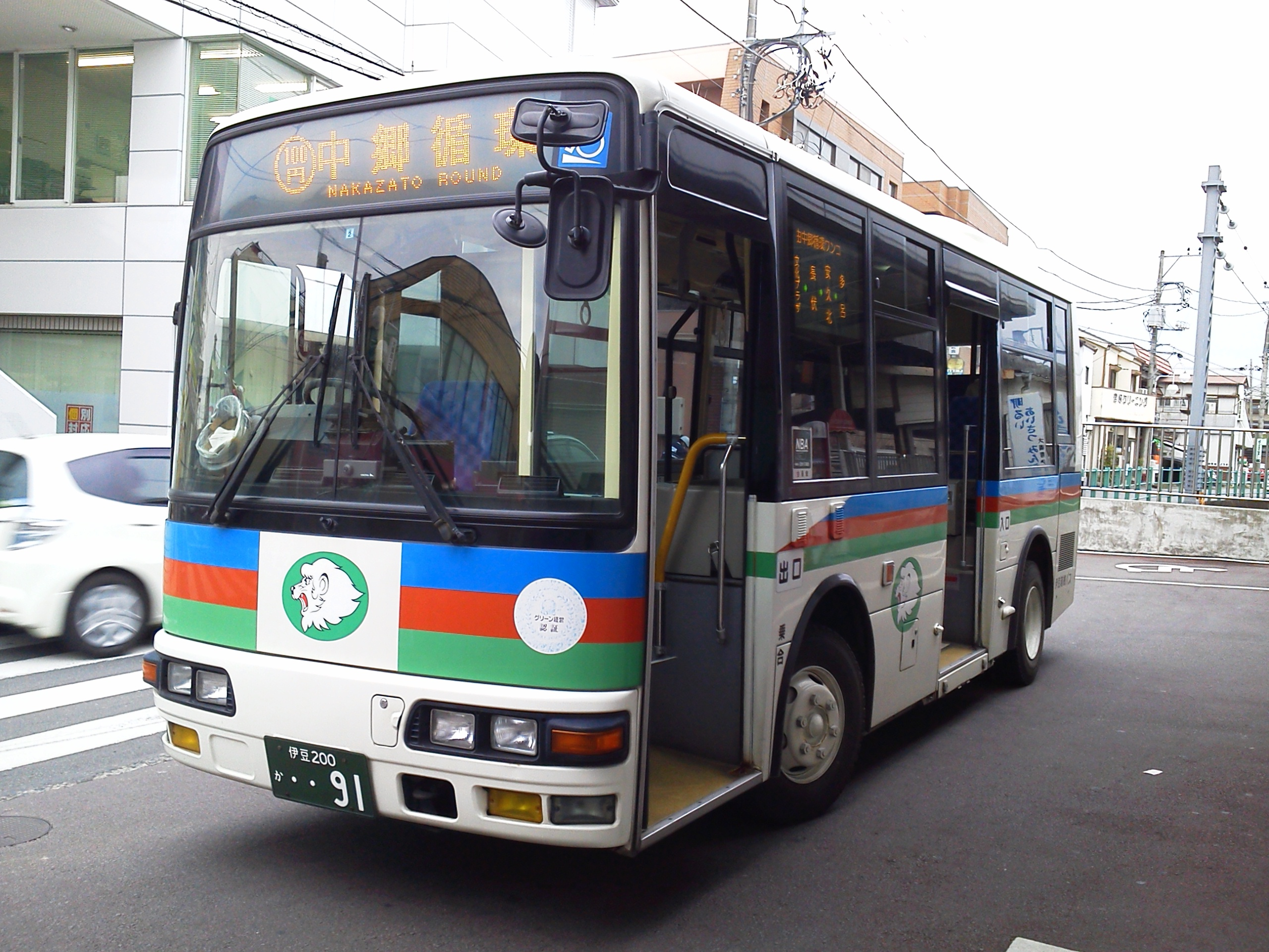 伊豆箱根バス 2061（三島営業所） 車種：三菱ふそう エアロミディME ナンバー：伊豆200か91 撮影場所：伊豆箱根鉄道 駿豆線 大場駅